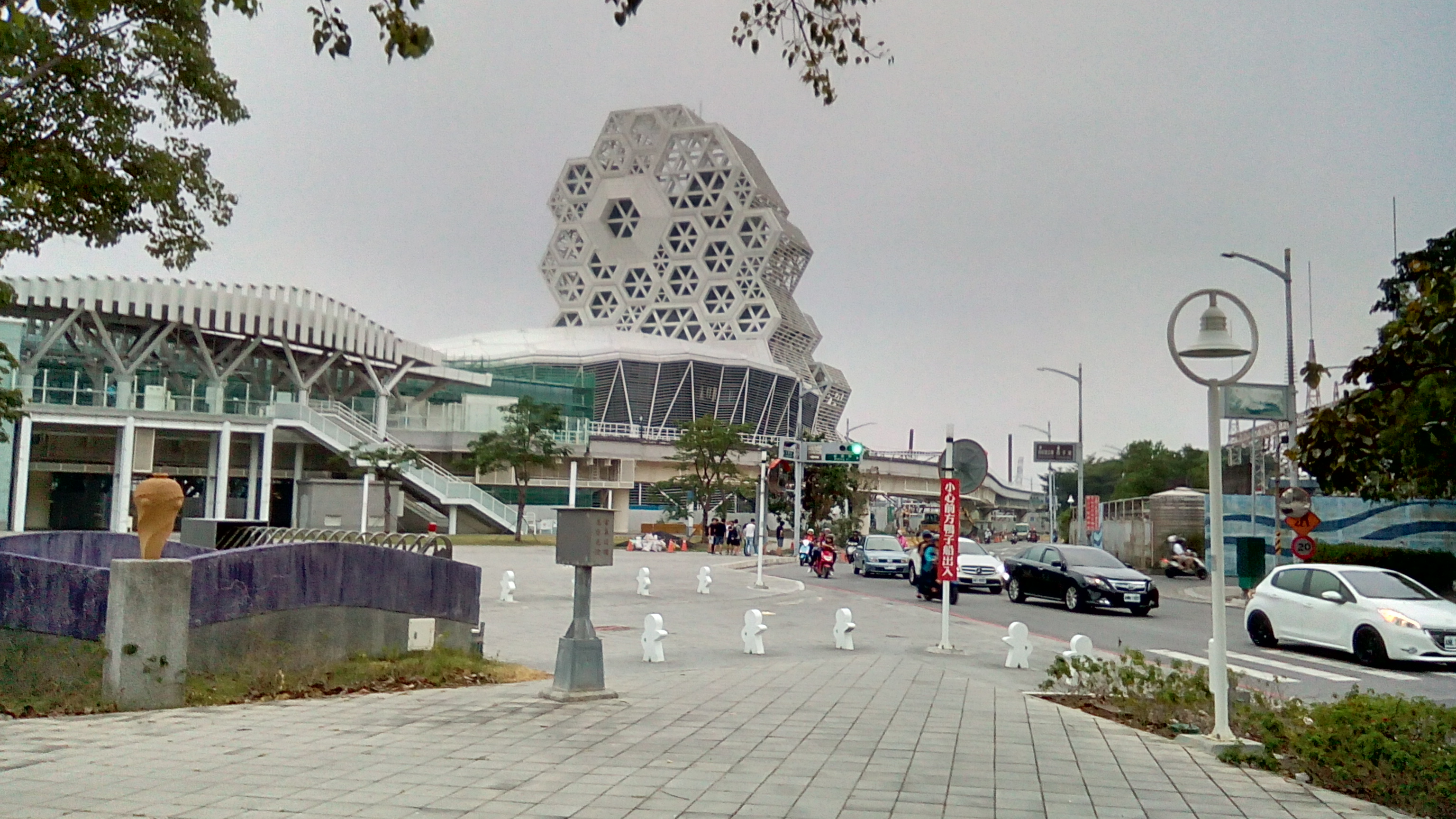 五福路高雄橋南方約200公尺處